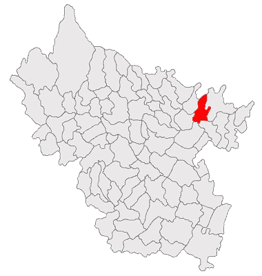 Categorie:Hărţi ale judeţului Buzău